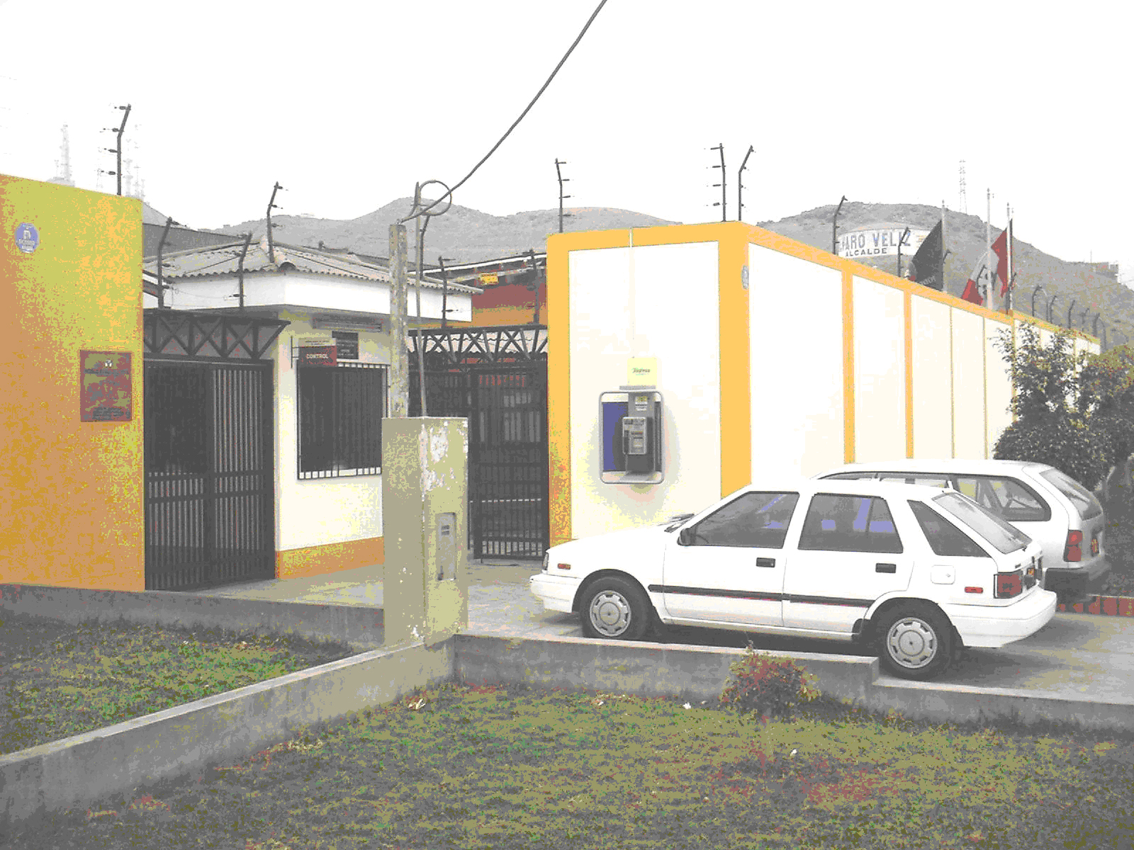 juzgado condevilla